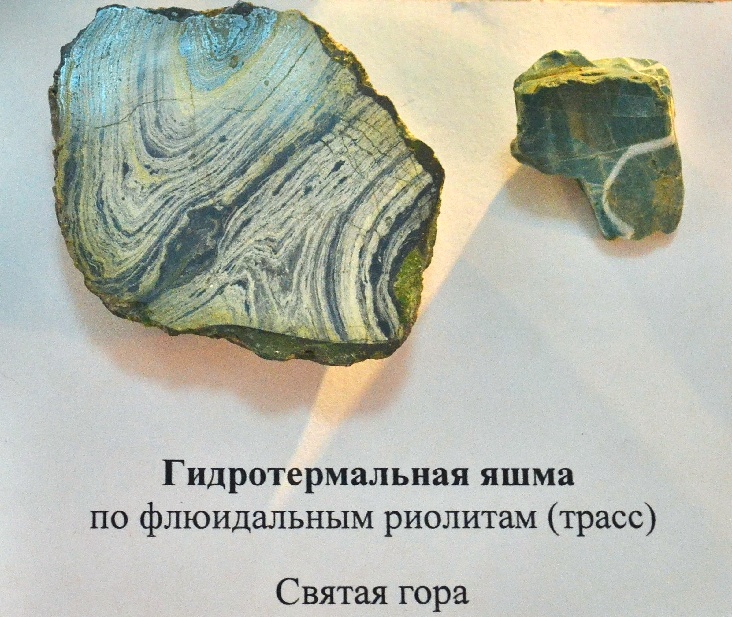 Гидротермальная яшма по флюидальным риолитам (трасс). Святая гора, Кара-Даг, Крым. Музей Карадагской биостанции.